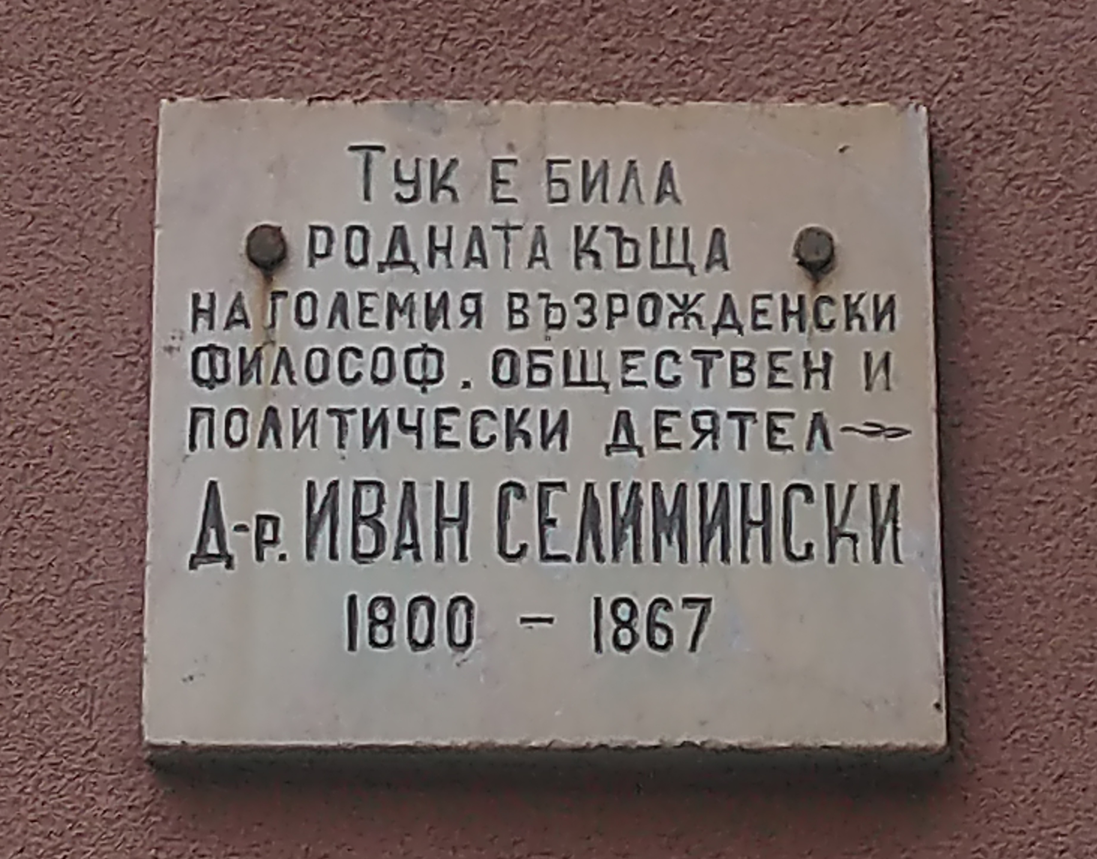 Паметна плоча на Иван Селимински, Сливен